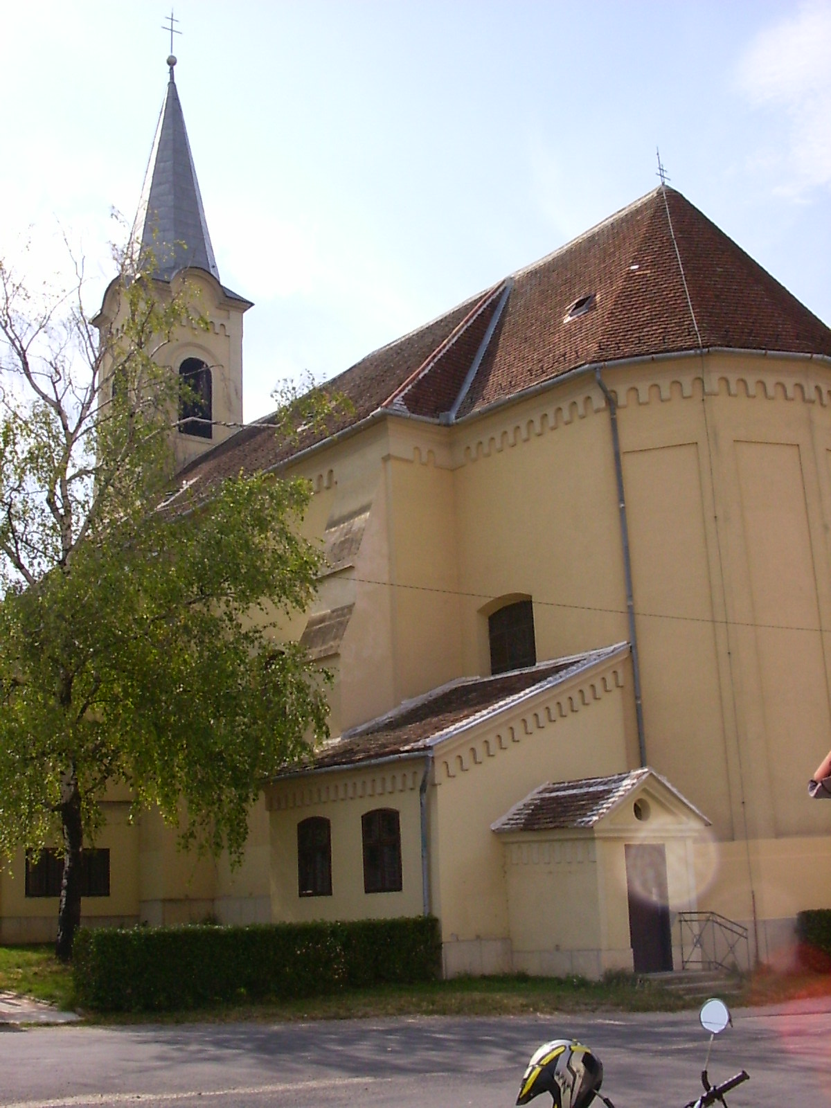 Szent Lórinc római katolikus templom Nagylózson